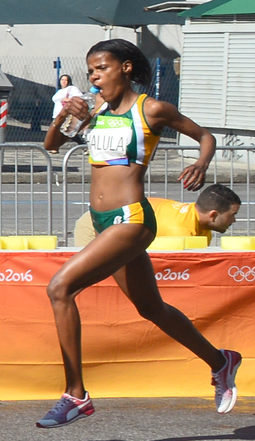 Passage du marathon des jeux olympiques de Rio 2016 dans le centre de Rio